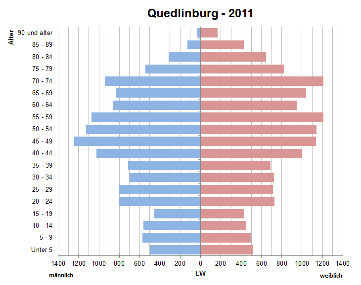 Bevölkerungspyramide der Stadt Quedlinburg nach Zensus 2011.